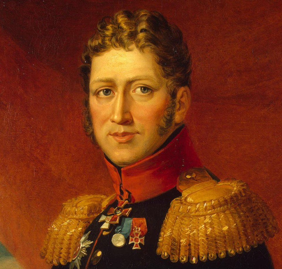 Tuyll van Seraskerken (1771–1826) Russian general